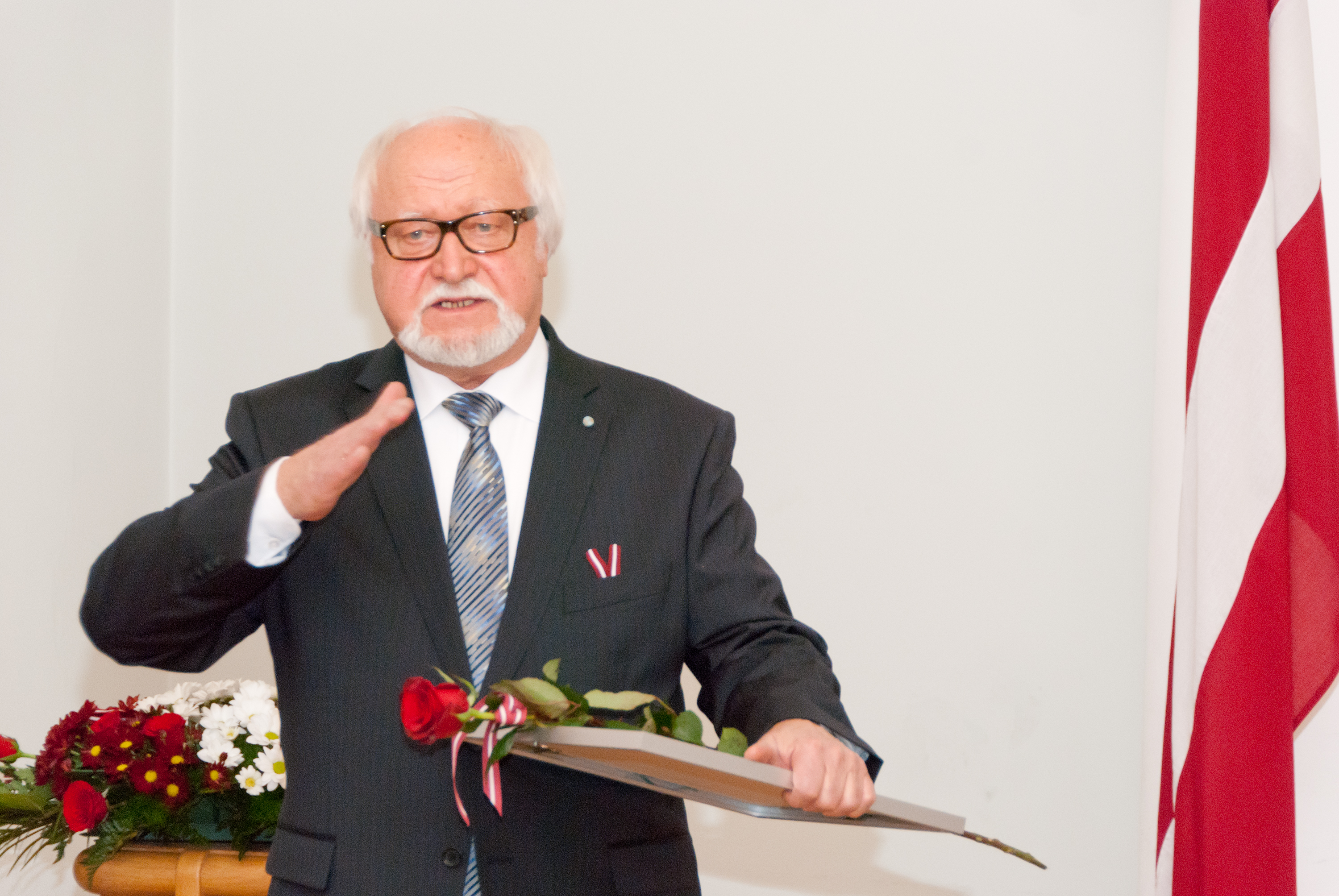 Attēlā (no kreisās): kinorežisors Jānis Streičs